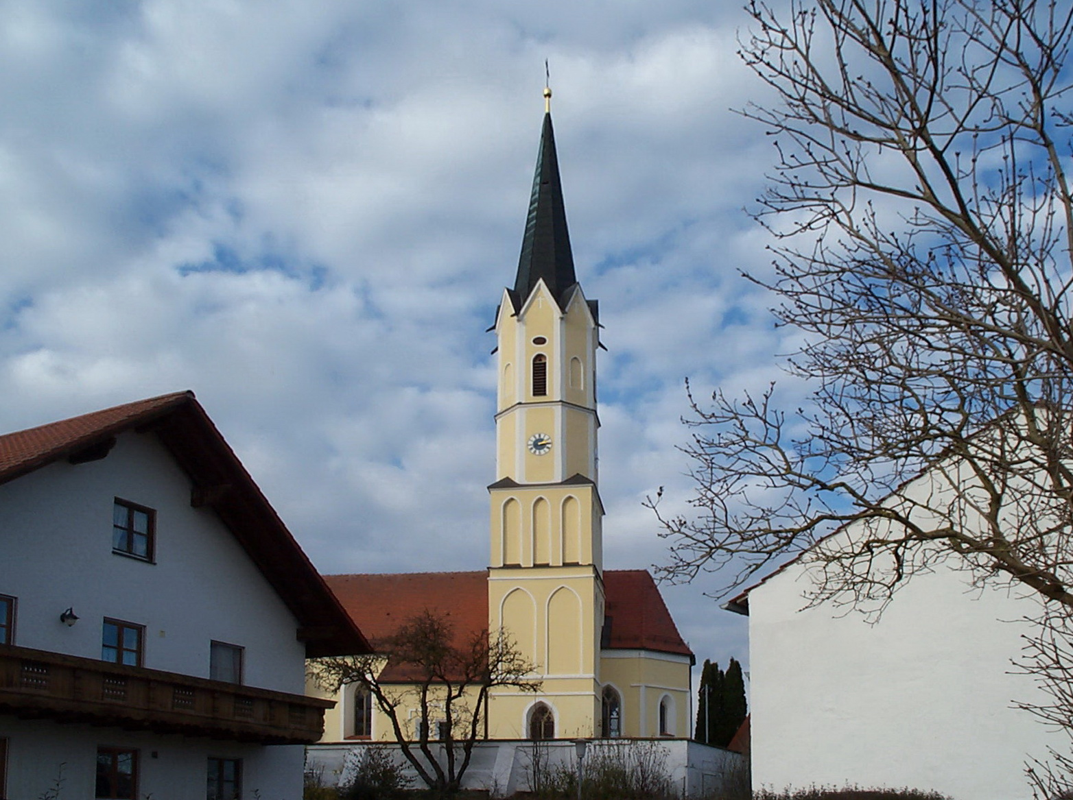 Oberneuhausen, Am Kirchberg 5. Kirche St. Peter und Paul. Langhaus romanisch, Chor spätgotisch, 2. Hälfte 15. Jh.; mit Ausstattung.